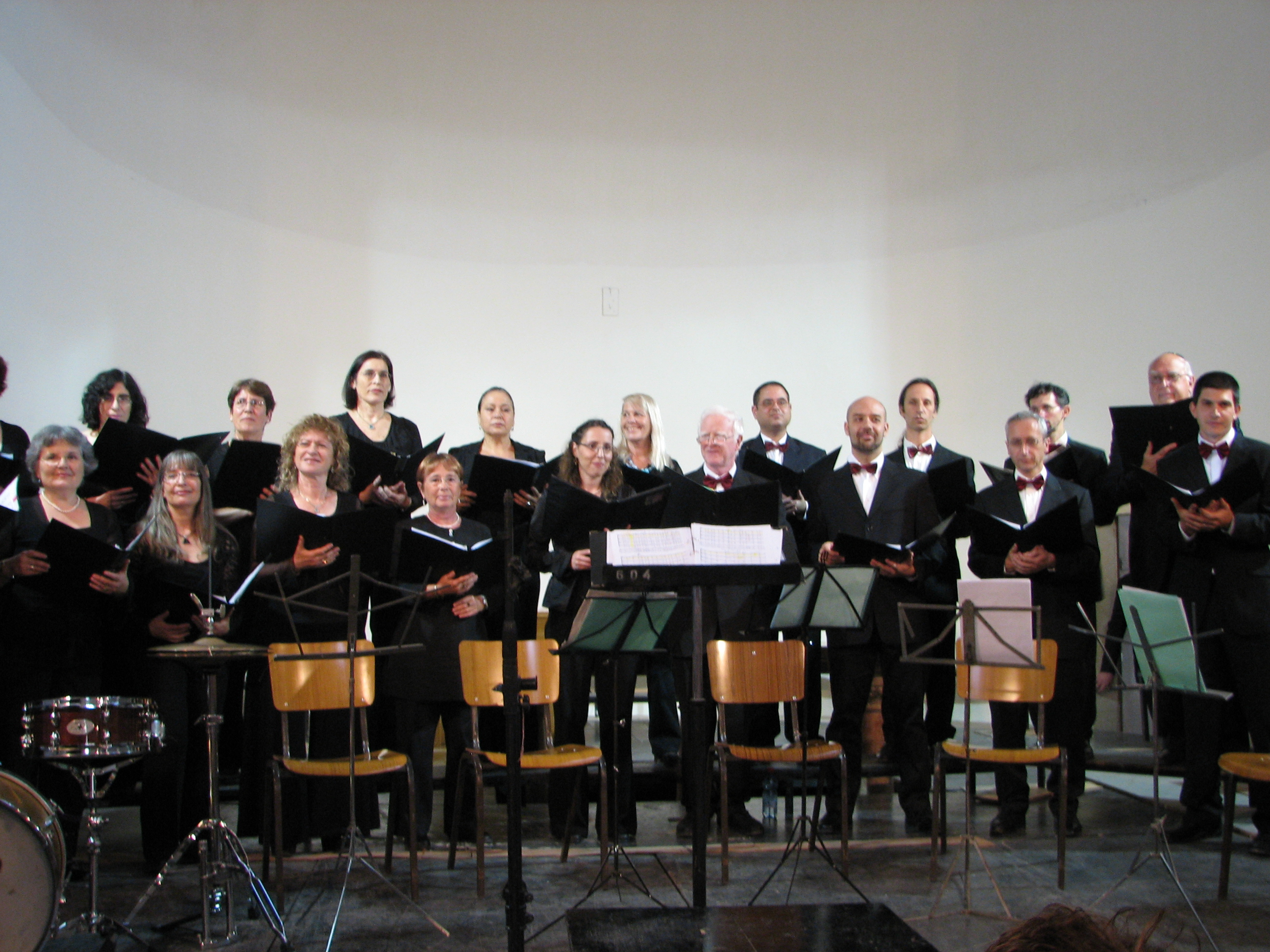 The Abu Ghosh Music Festival is held twice a year, in the fall and late spring, with musical ensembles and choirs from Israel and abroad performing in and around the churches in Abu Ghosh אנסמבל זמרי א-קפלה ירושלים, בהופעה בפסטיבל אבו גוש ביום 21 במאי 2010 במופע הקסם הבולגרי הסרבי והצ'כי פסטיבל אבו גוש הוא פסטיבל מוזיקה ווקאלית, המתקיים כיום בסוכות ובשבועות, בכנסיית גבירתנו של ארון הברית ובכנסיות של המנזר הבנדיקטיני